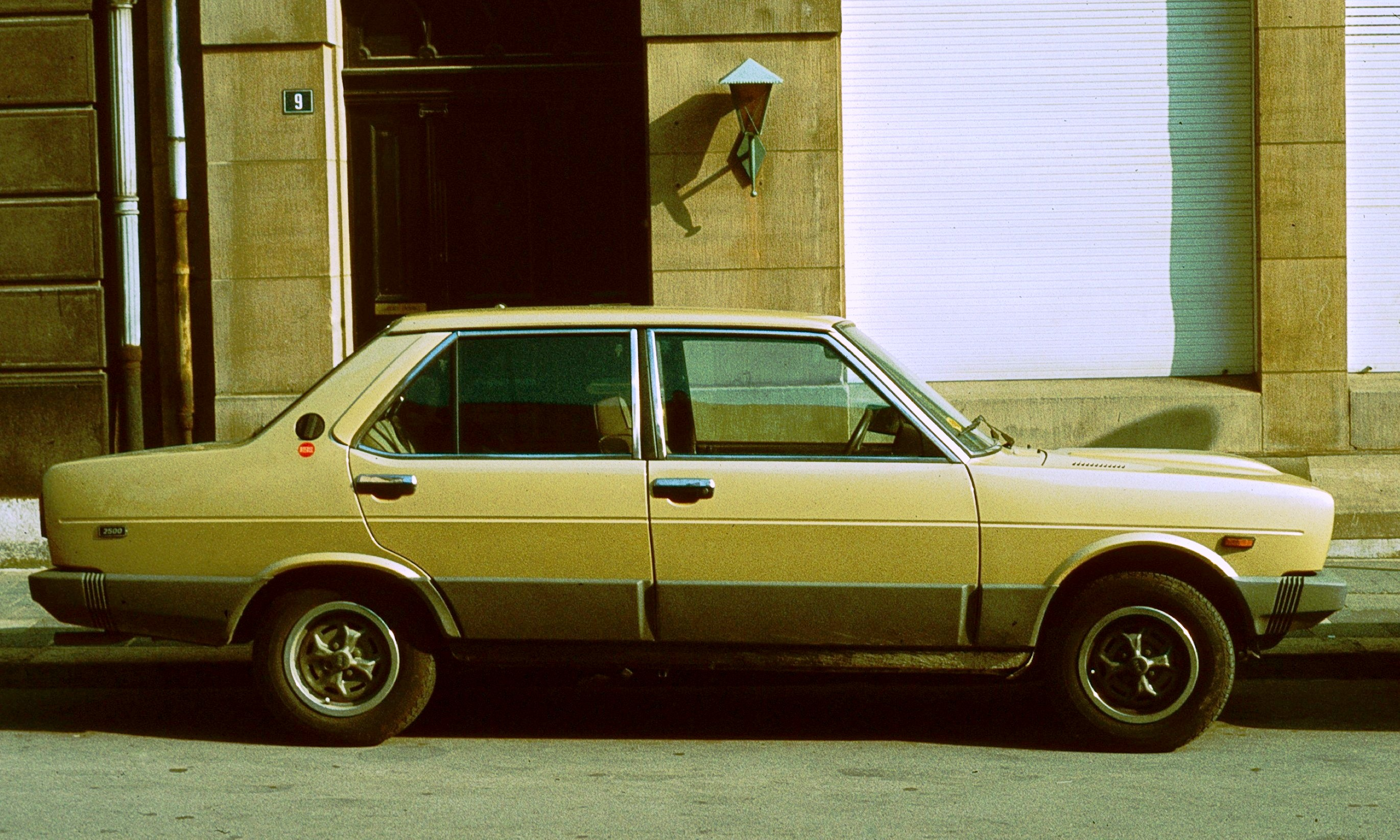 Fiat 131 2.5L diesel post 1981 facelift in profile